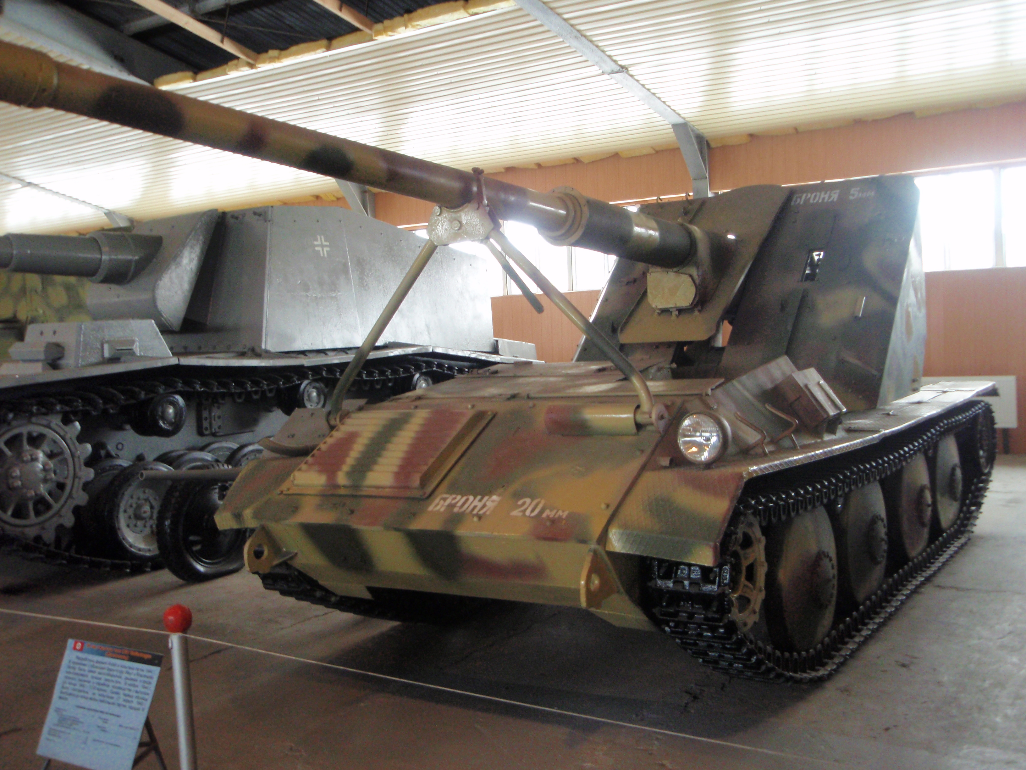 Немецкая САУ Waffenträger в Кубинке